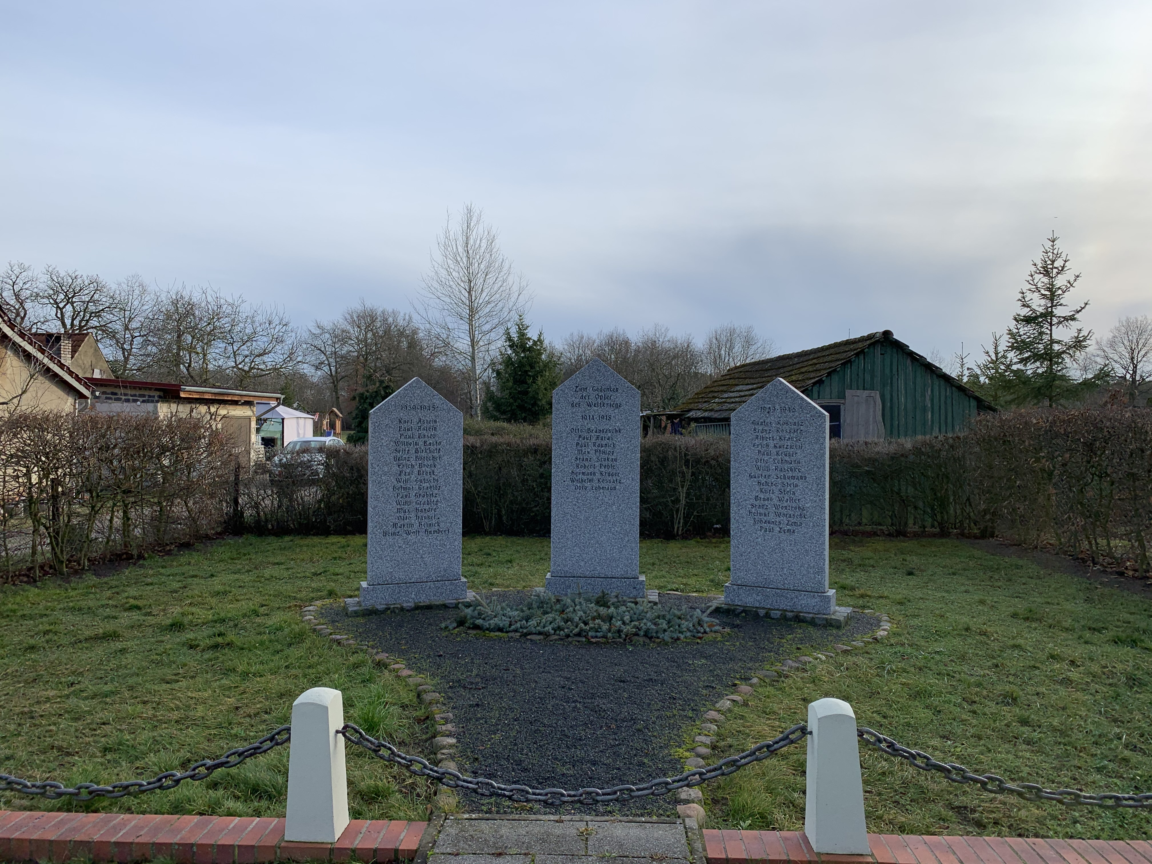 Denkmal für die Gefallenen der Weltkriege in Muckwar, Brandenburg